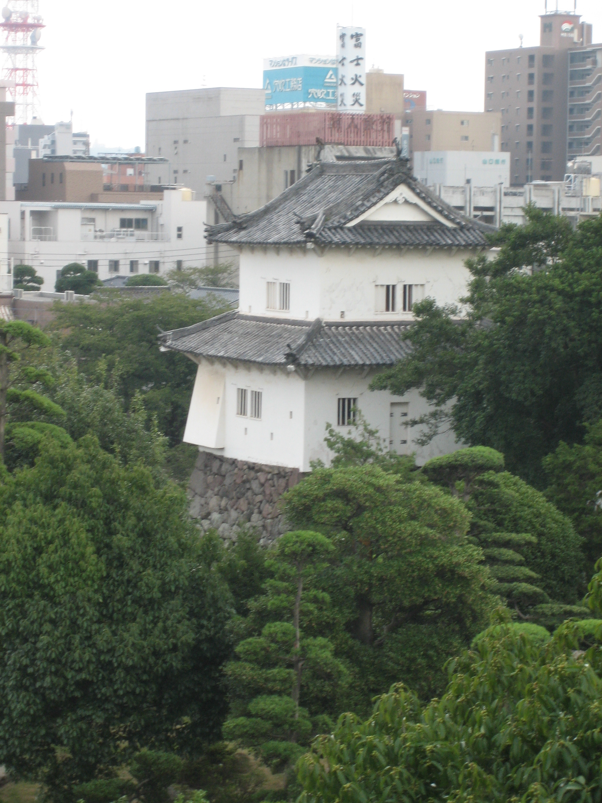 Funai Castle Nijuu-yagura in Higasinomaru